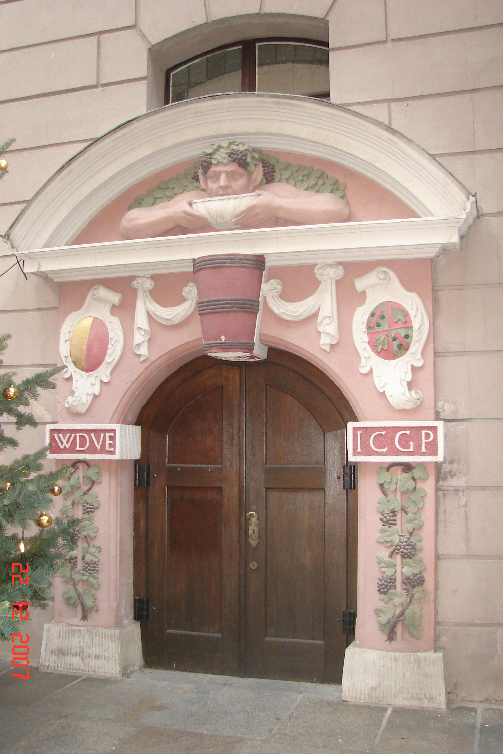 Sekundogenitur Dresden, ehemaliges Portal der Hellerschänke auf der Rückseite des Gebäudes